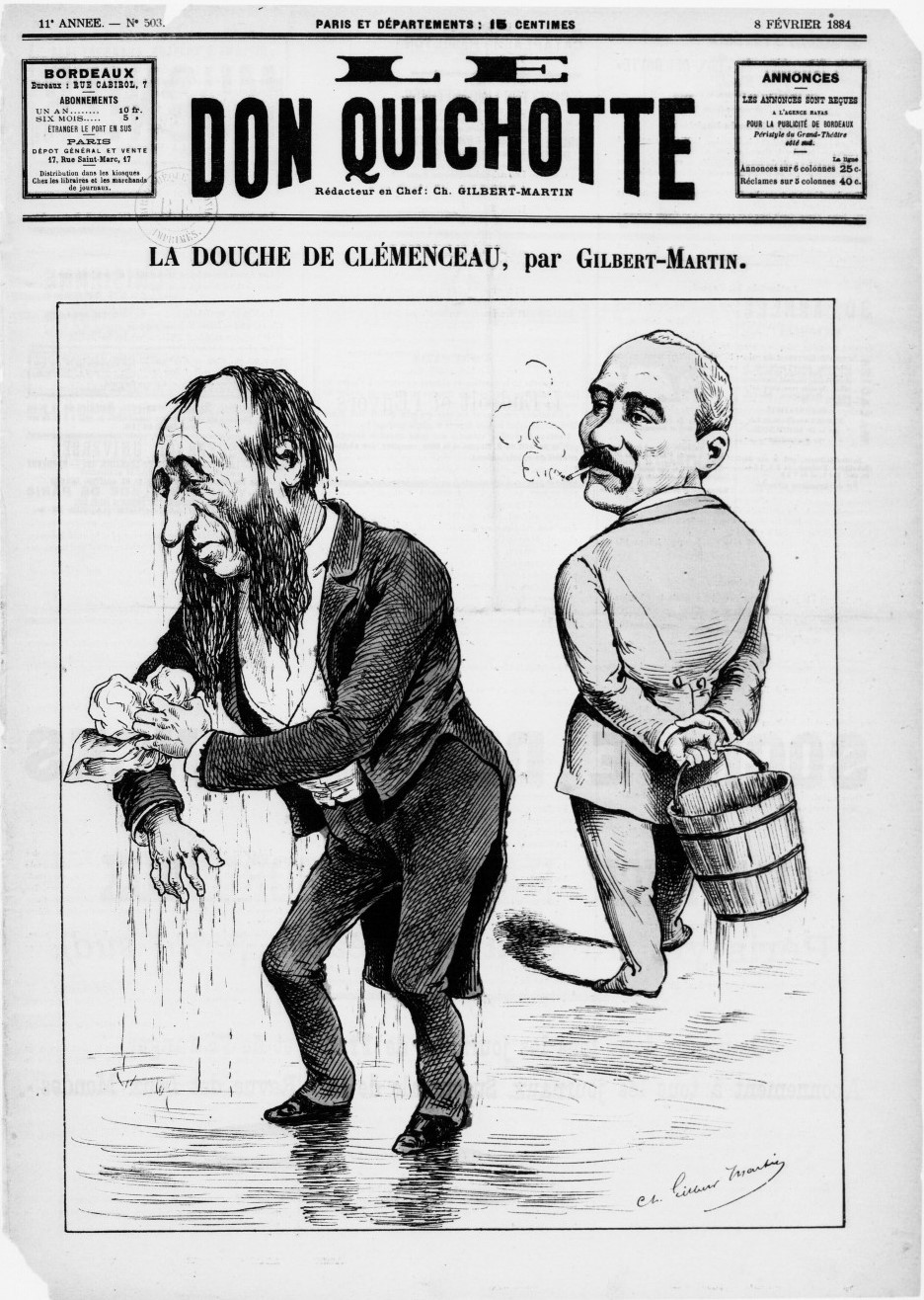 "La douche de Clemenceau", Le Don Quichotte, n°503, 8 février 1884.